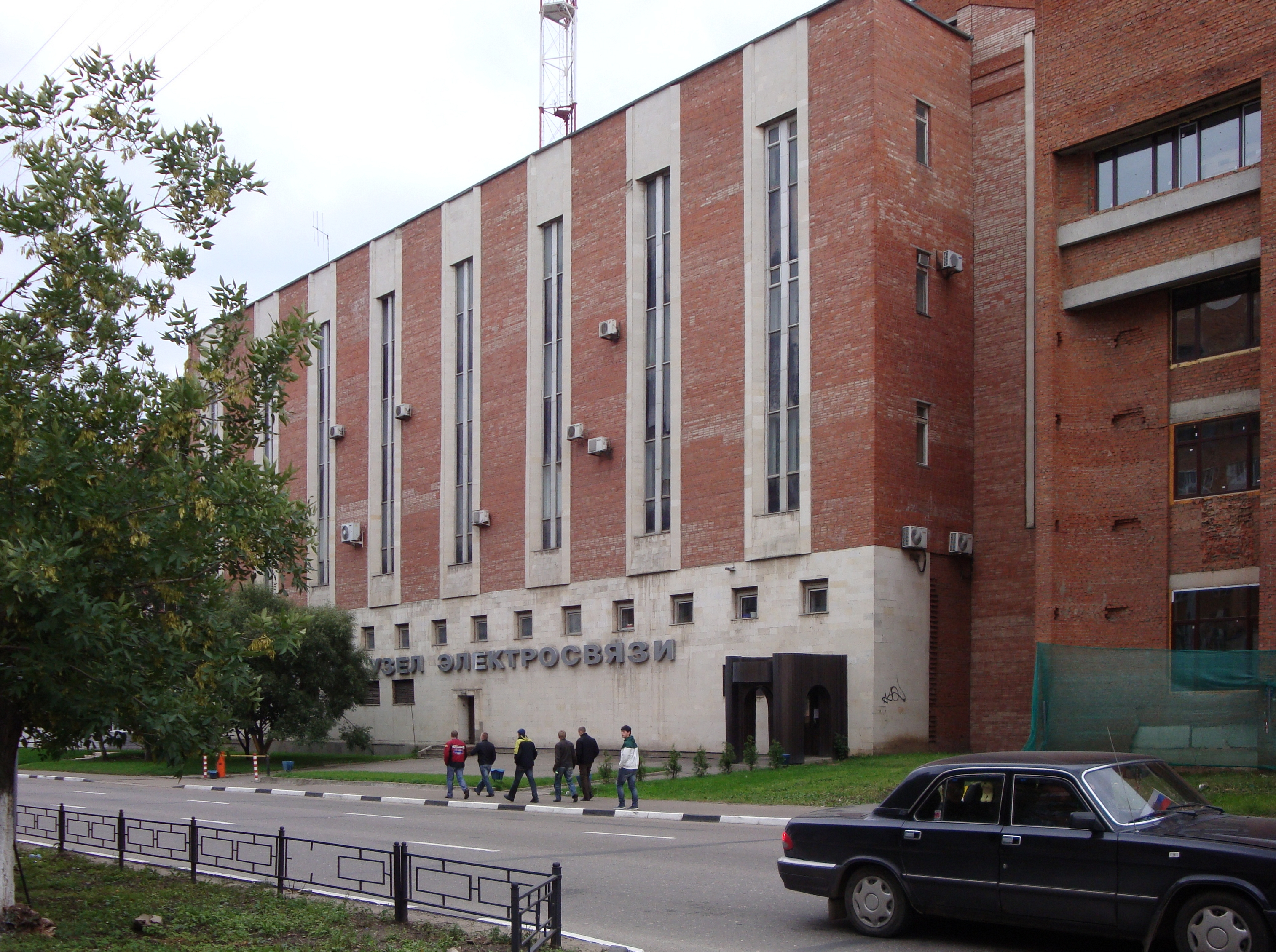 Подольский узел электросвязи (Подольск, Московская область)